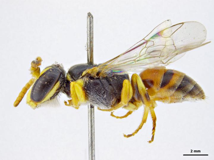 Hylaeus sanguinipictus male